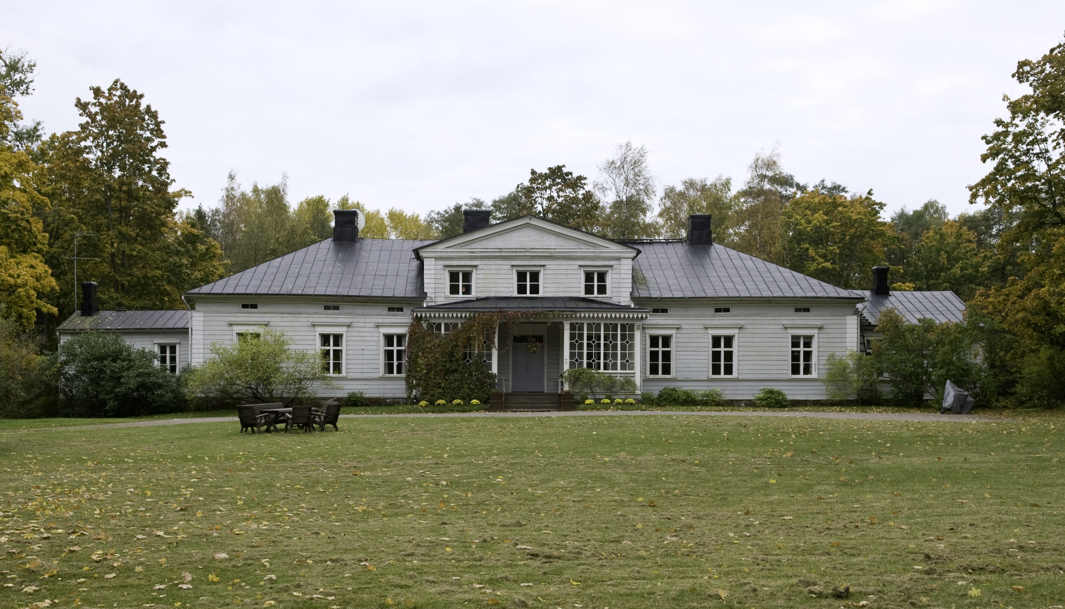 Degerön kartanon päärakennus, Pastorintie 1, Helsinki